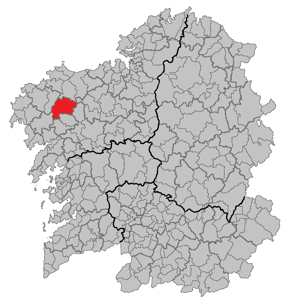 Mapa coa localización do concello de Santa Comba.